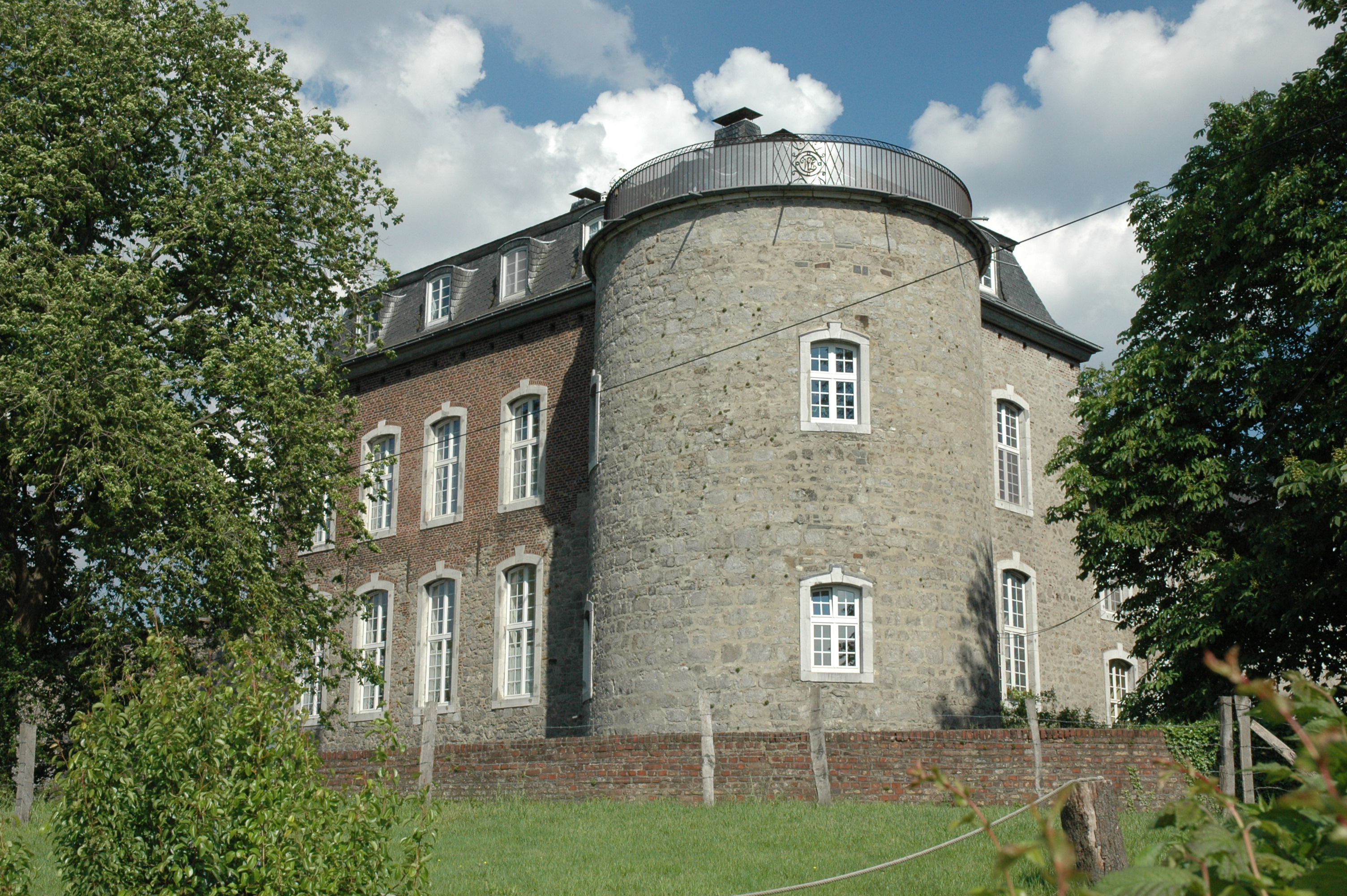 Südwestlicher Eckturm und Herrenhaus des Guts Kalkofen in Aachen